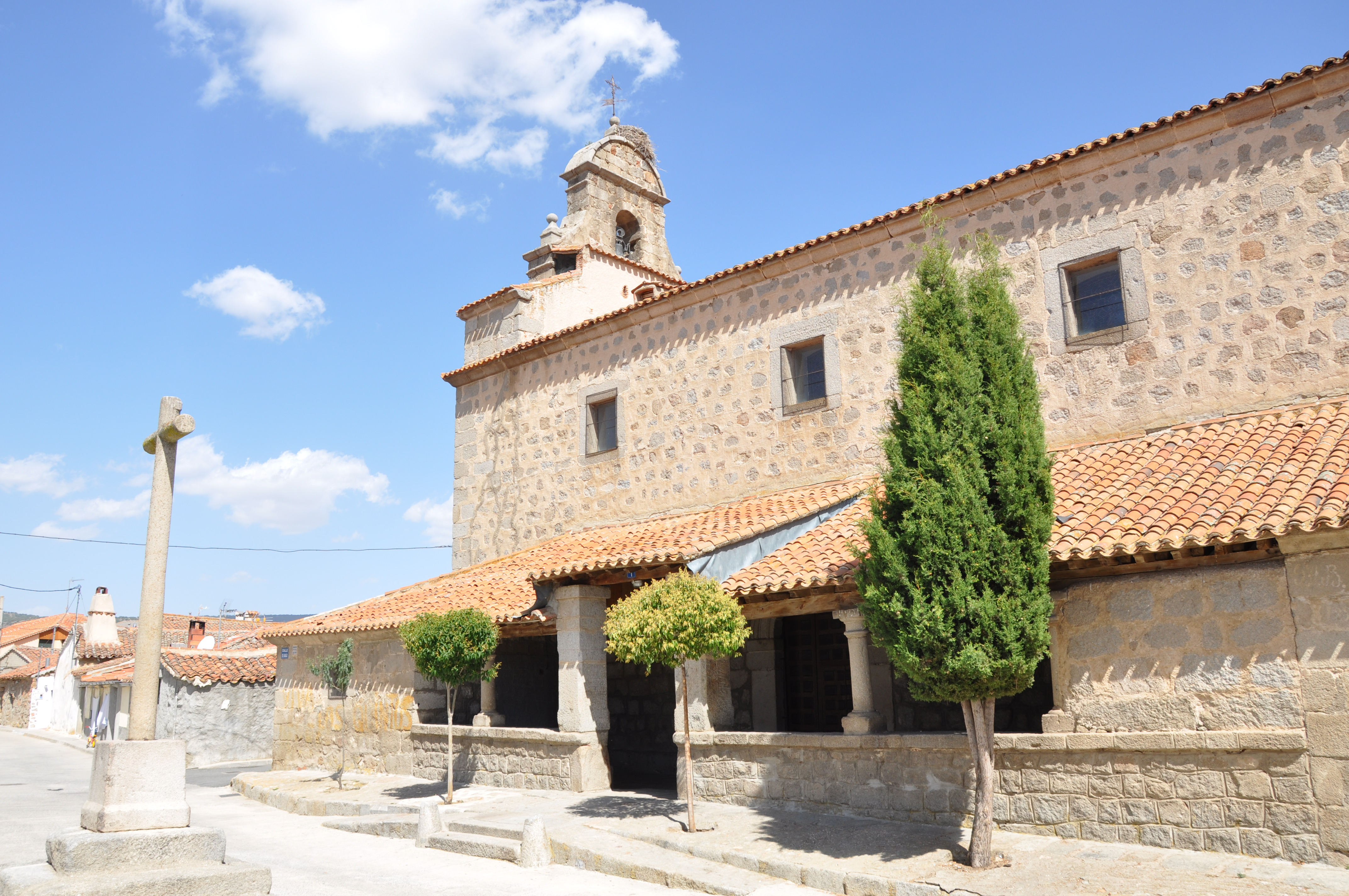 Iglesia de la Asunción, Padiernos, Ávila, España